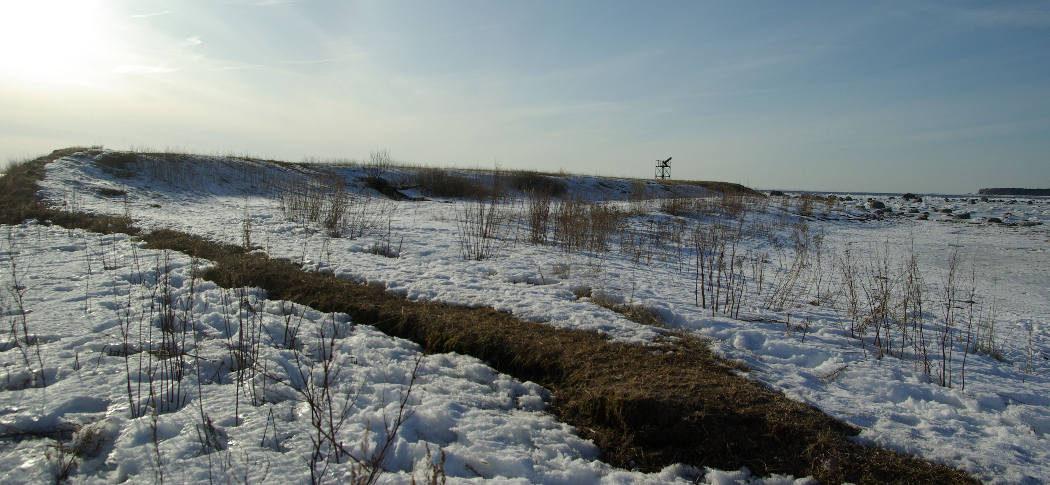 saar Viimsi poolsaare lääneküljel Püünsi küla kohal